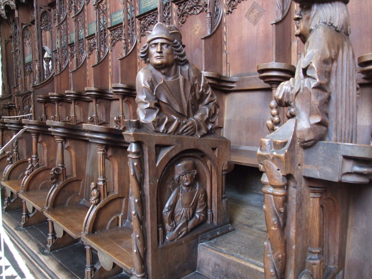 Chorgestühl in St. Martin. Porträt des Kirchenpflegers Hans Holzschuher.